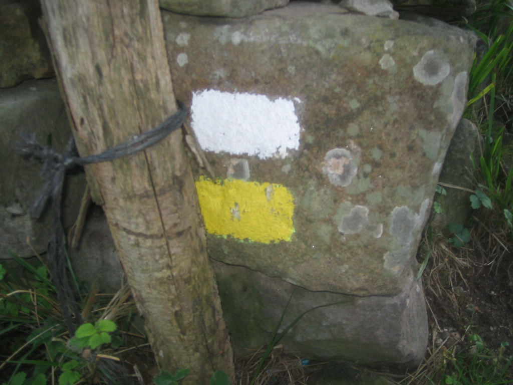 Señal de Sendero de Pequeño Recorrido PR en Yermo, Cantabria, España